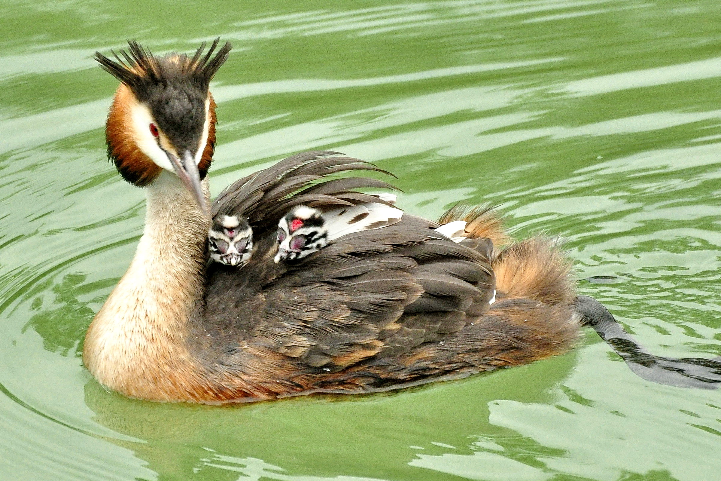 Podiceps cristatus on Obersee (upper Lake Zürich) respectively Seedamm and the wooden bridge (Holzbrücke) between Hurden and Rapperswil in Switzerland